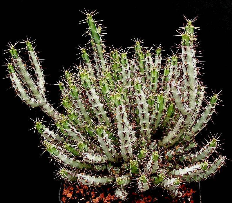 Euphorbia limpopoana